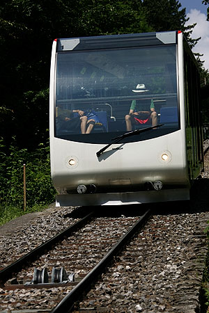 Biel / Bienne: Funiculaire nach Magglingen (Macolin)